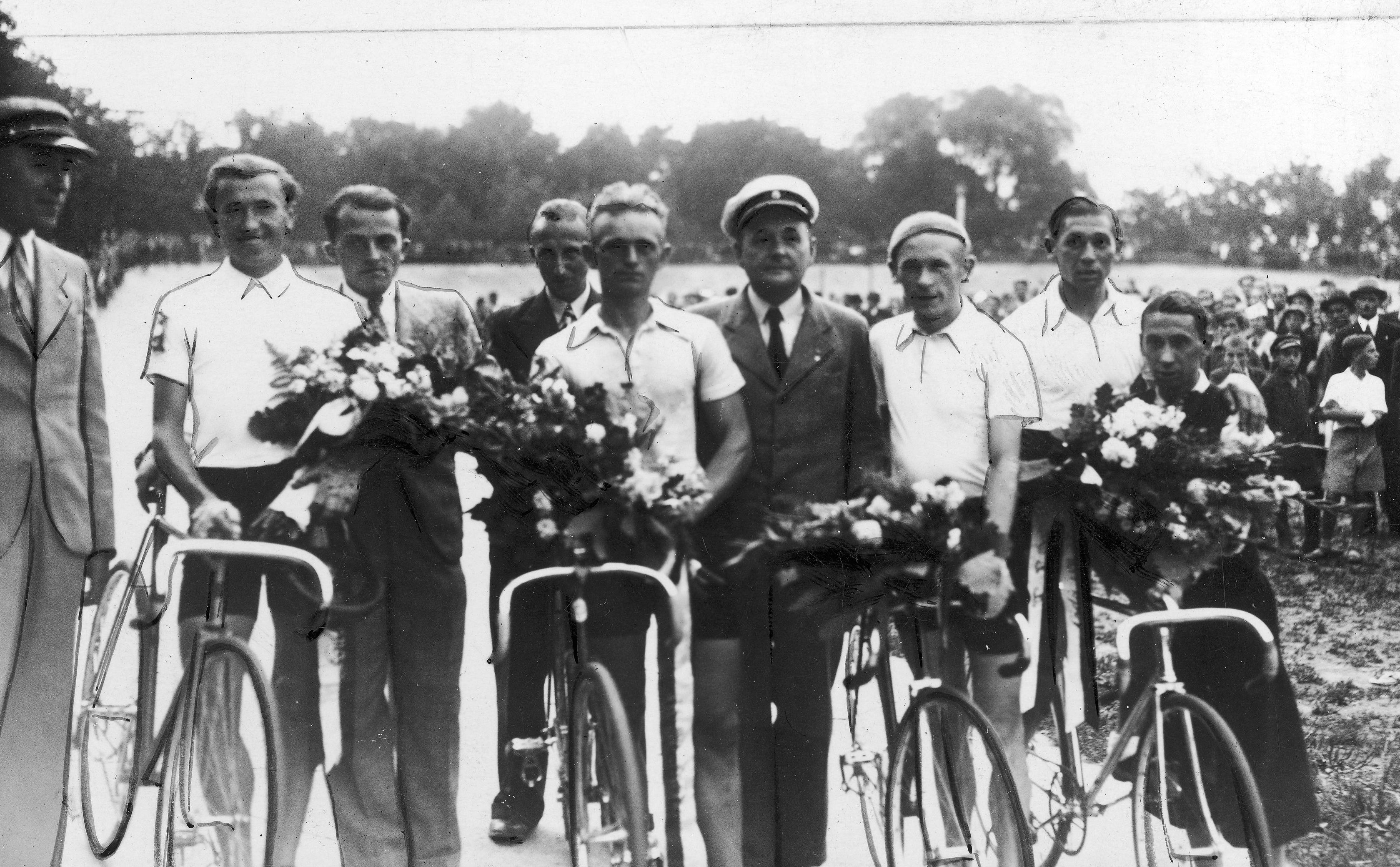 Drużynowe mistrzostwa Polski w kolarstwie torowym w Łodzi, 1937. Zwycięska drużyna z warszawskiego klubu Syrena. Widoczni kolarze: Wacław Starzyński (2. z lewej), Oswald Miller (5. z lewej), Stefan Popończyk (2. z prawej), Ryszard Stahl (3. z prawej) oraz sędzia sportowy Piotr Tkaczyk (4. z prawej).Zwycięska drużyna z warszawskiego klubu Syrena. Widoczni kolarze: Wacław Starzyński (2. z lewej), Oswald Miller (5. z lewej), Stefan Popończyk (2. z prawej), Ryszard Stahl (3. z prawej) oraz sędzia sportowy Piotr Tkaczyk (4. z prawej).